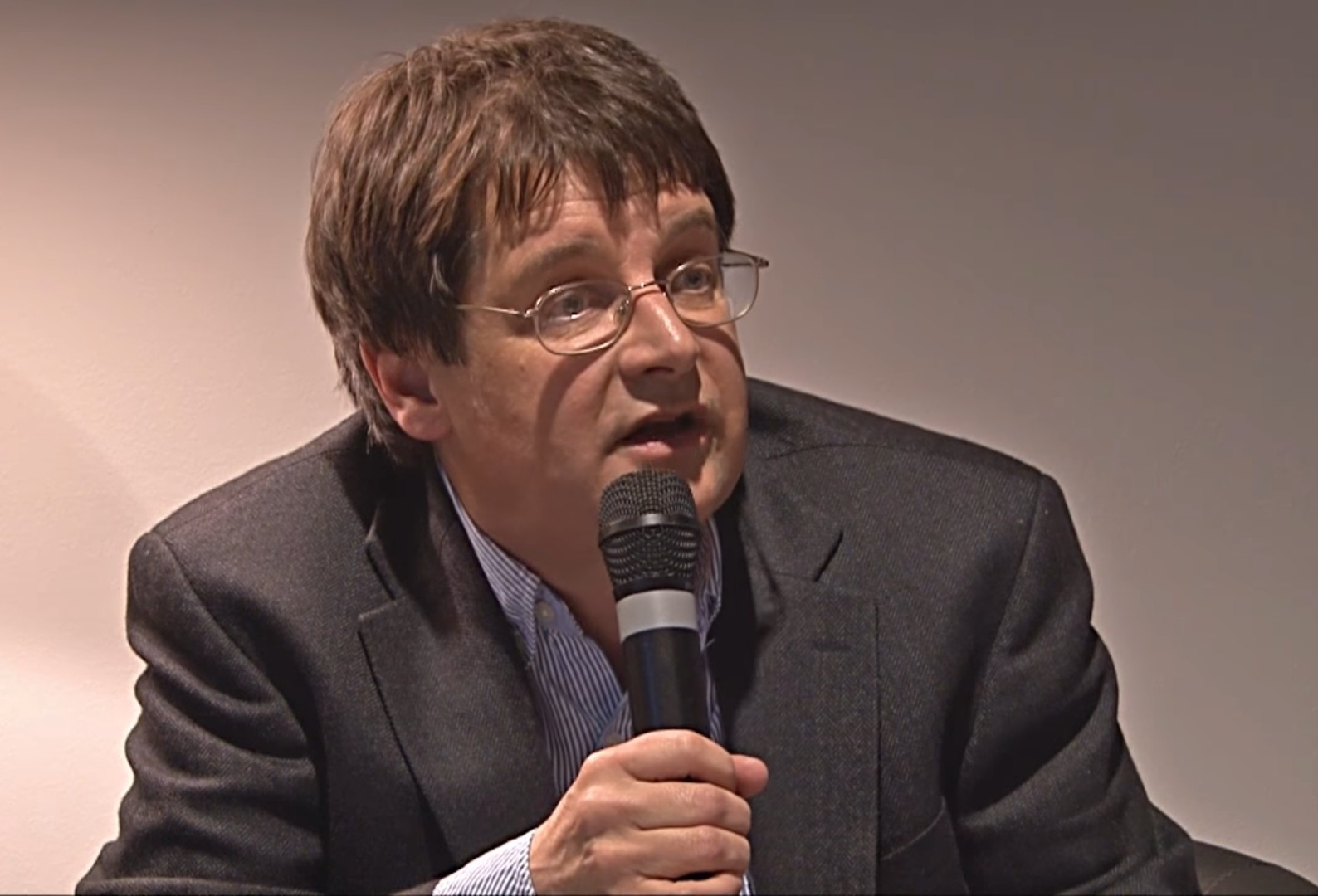 Was passiert, wenn die Natur zur Ware wird? «Luxemburg Lecture» mit John Bellamy Foster Die ökologische Krise ist eine der großen Herausforderungen unserer Zeit. Und eine der großen Fragen lautet, ob diese Krise innerhalb eines grün angestrichenen Kapitalismus lösbar ist ('Green Economy') oder ob es dafür einer weitergehenden sozial-ökologischen Transformation bedarf. John Bellamy Foster, Ökosozialist der ersten Stunde, erklärt, warum jeder Kapitalismus die Umwelt zerstören muss und welche Schritte notwendig wären, um einer Lösung der ökologischen Krise näherzukommen. Die Veranstaltung wird simultan übersetzt.